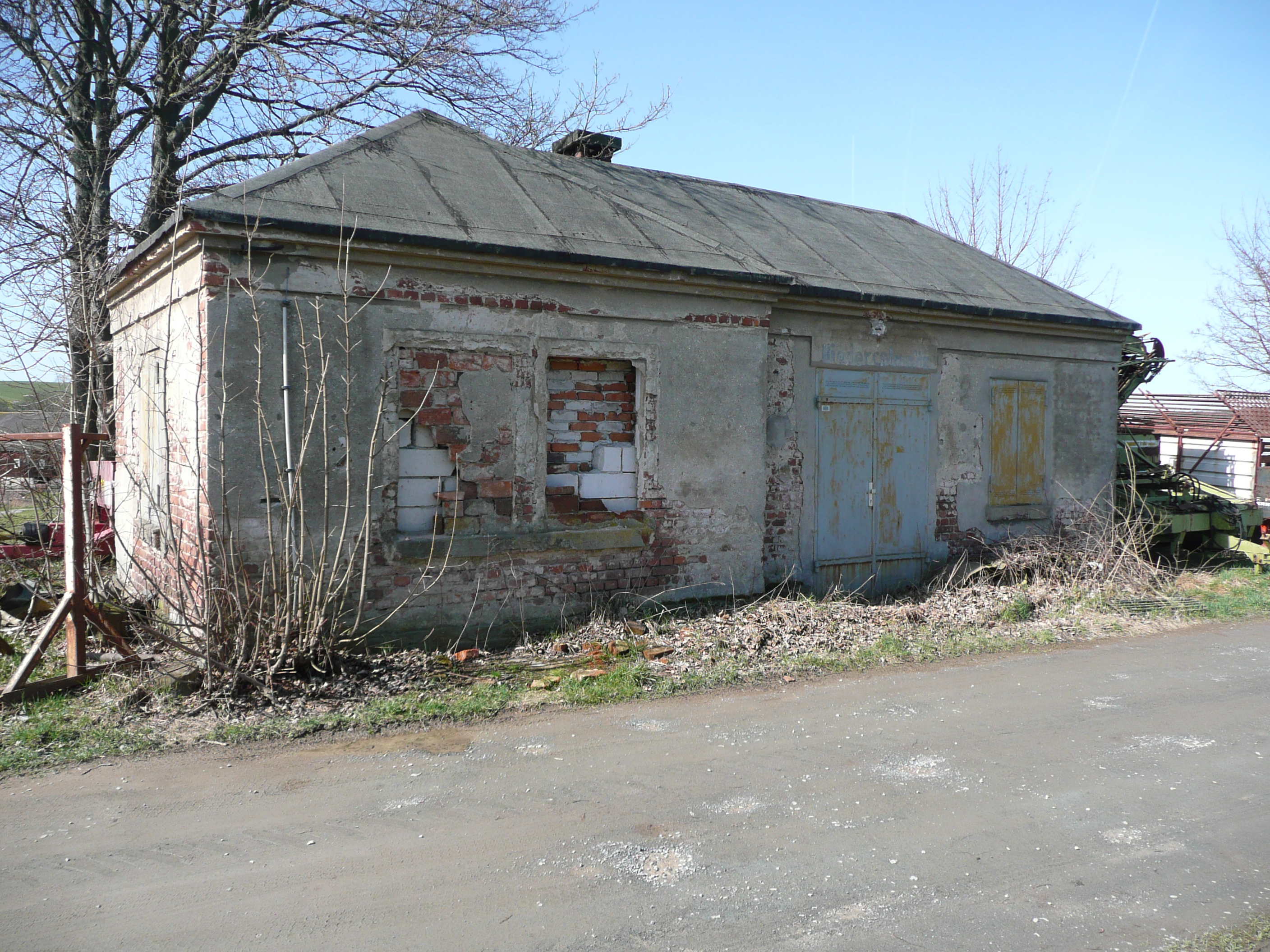 ehemalige Bahnstation Niedercollmnitz